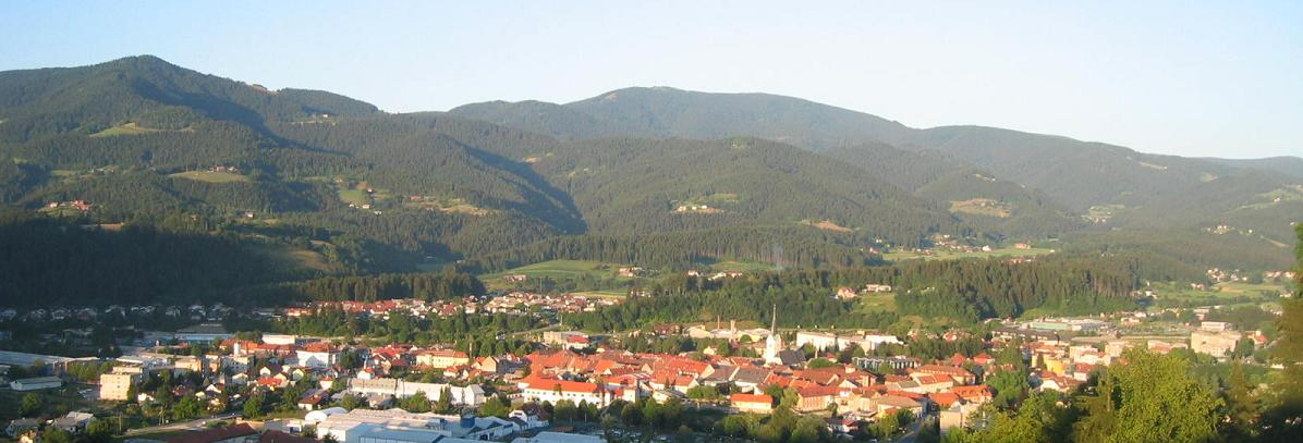 Slovenj gradec (town in Slovenia) photo:Ziga 21:31, 12 August 2006 (UTC)